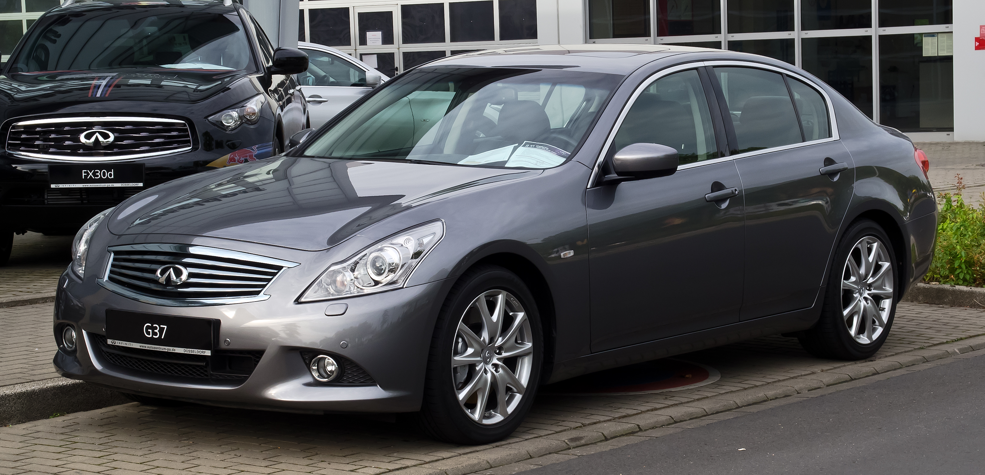 Infiniti G37 S (V36, Facelift)